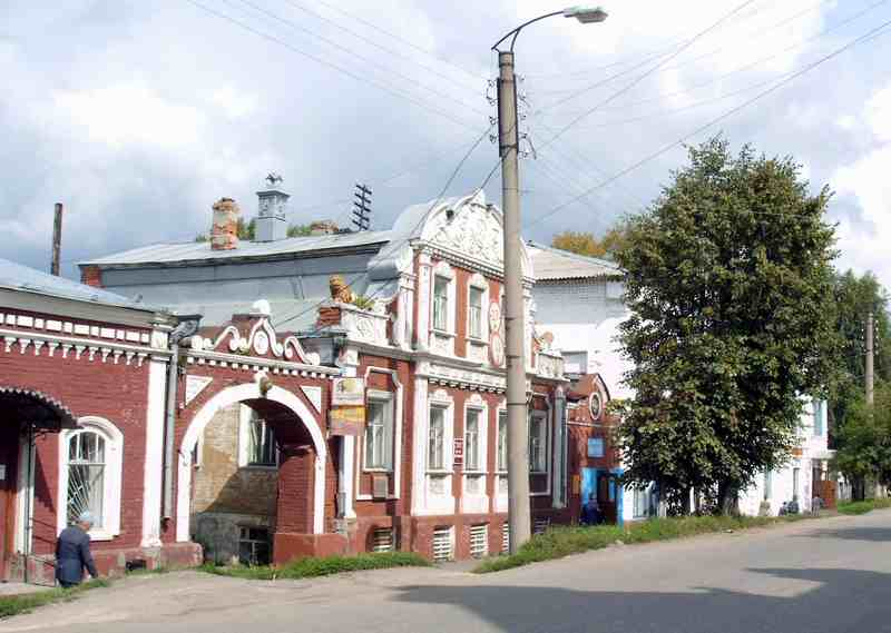 Купеческие особняки на улице Ленина в Советске Кировской области